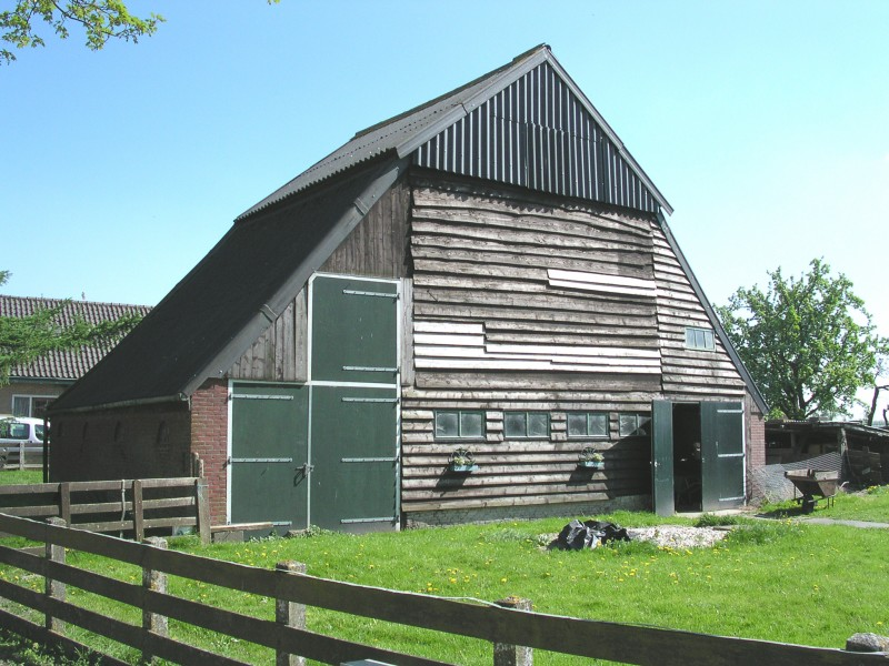 Een schapenboet (hooischuur) in Sijbekarspel. West Frisian sheep barn (hay barn) in the village of Sijbekarspel.